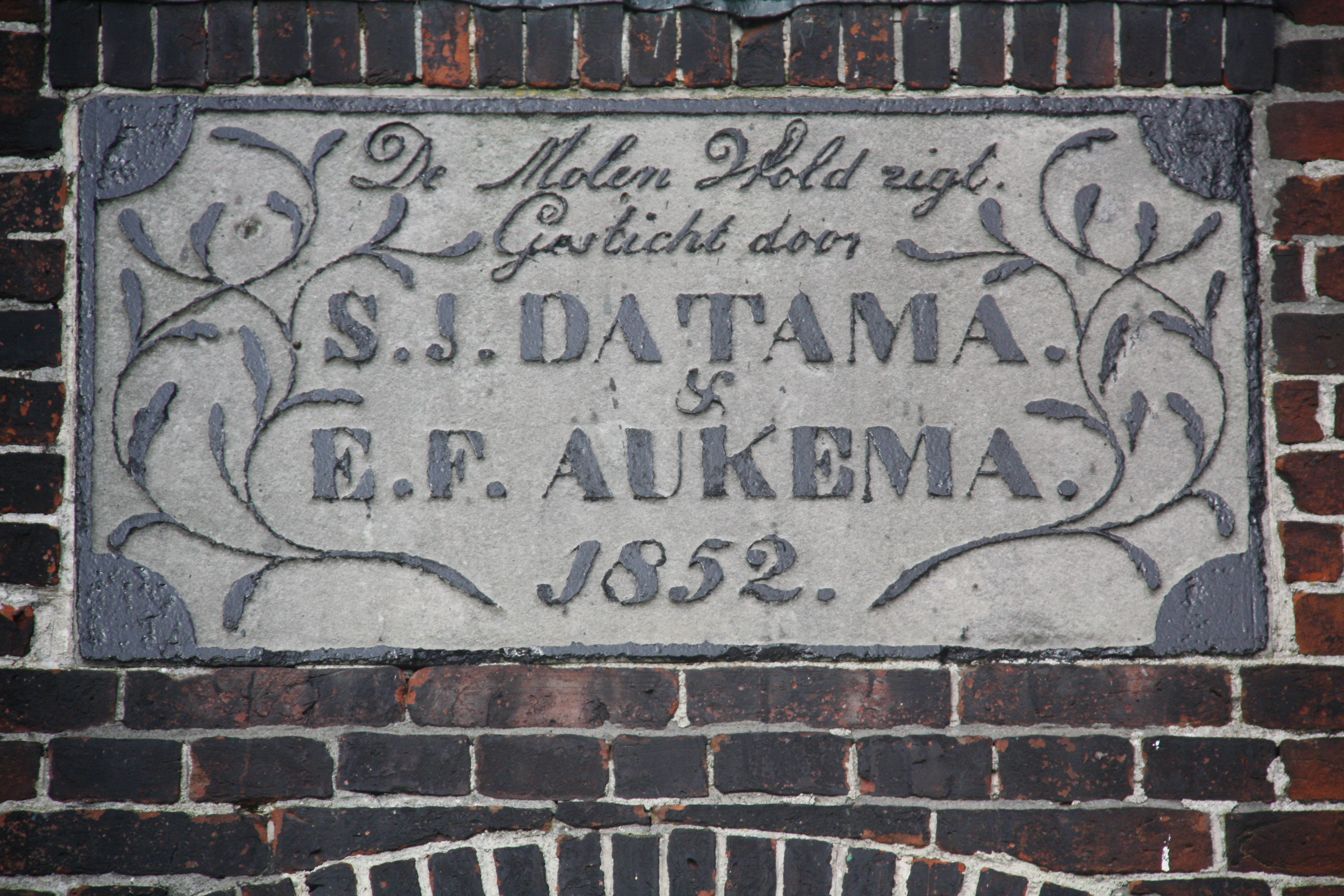 Woldzigt